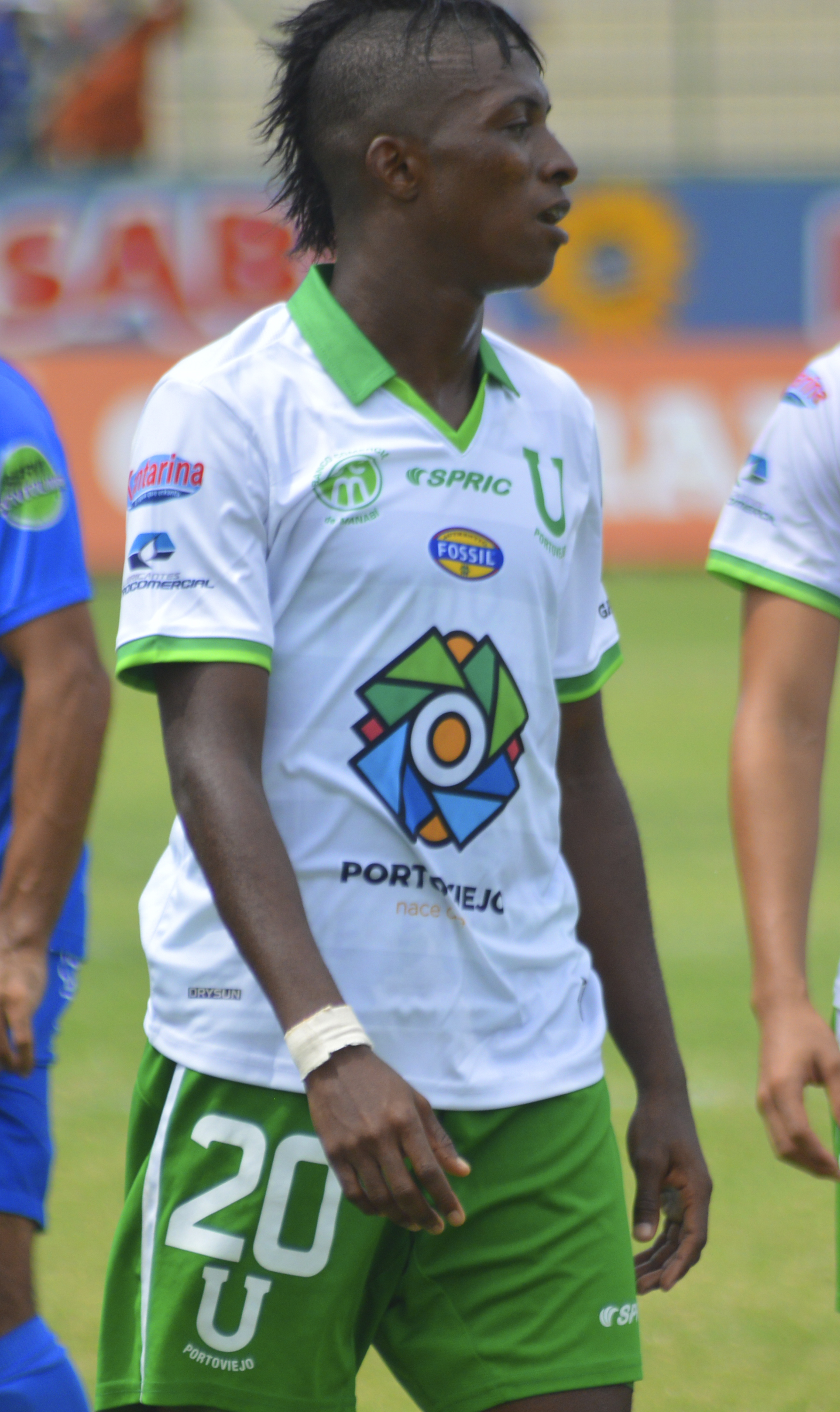 Carlos Arboleda jugando para Liga de Portoviejo en 2015